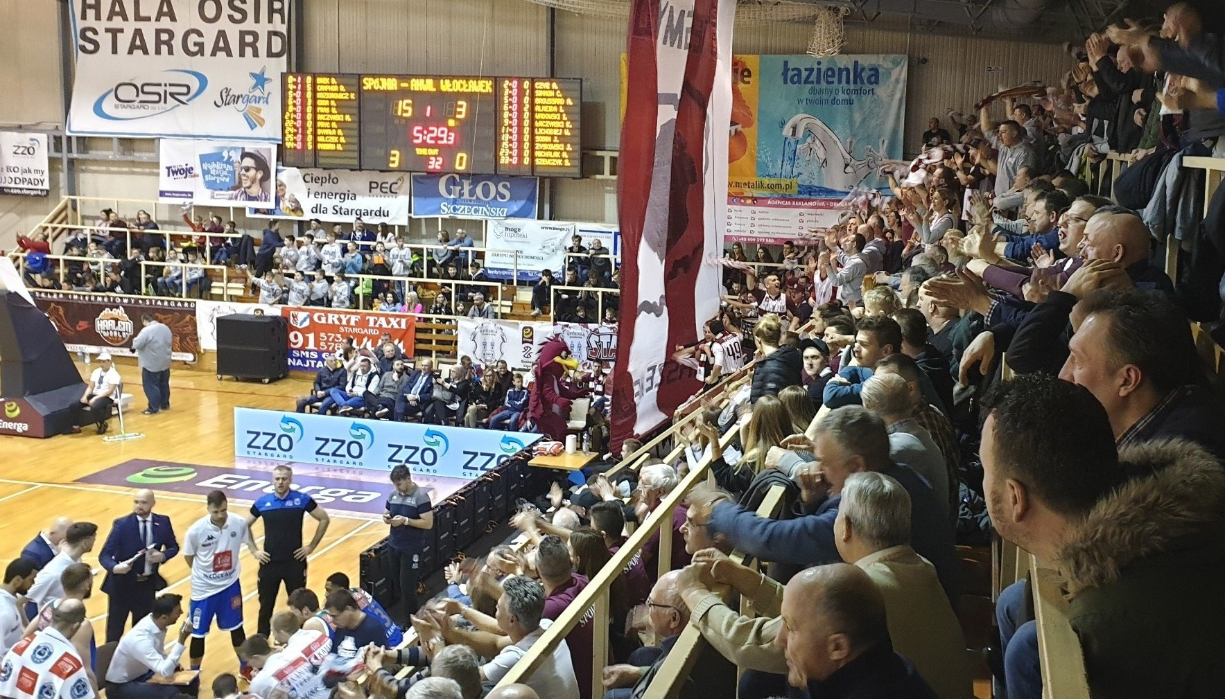 Stargard, 02.03.2019. Pierwsza Brygada